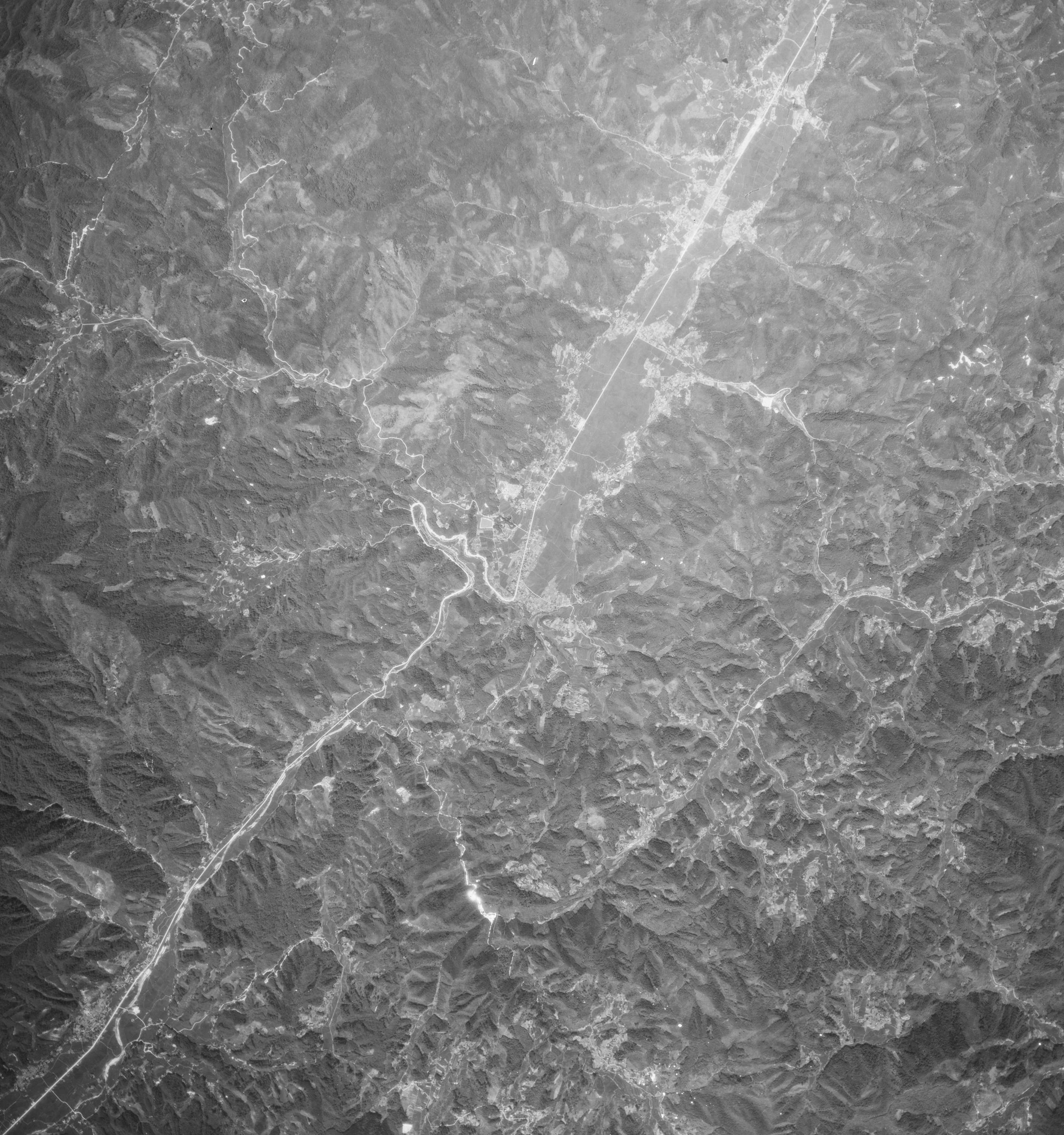 1947年広島県上根峠周辺